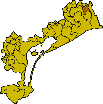 Ubicación del municipio de Fossalta di Portogruaro en el Venecia.